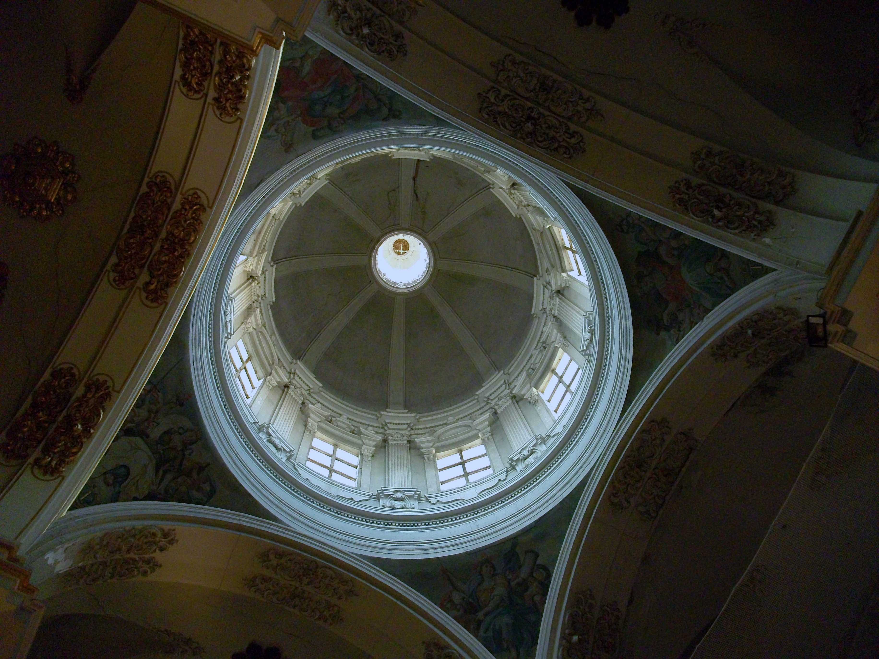 Interior de la cúpula de l'església de sant Sebastià de València.